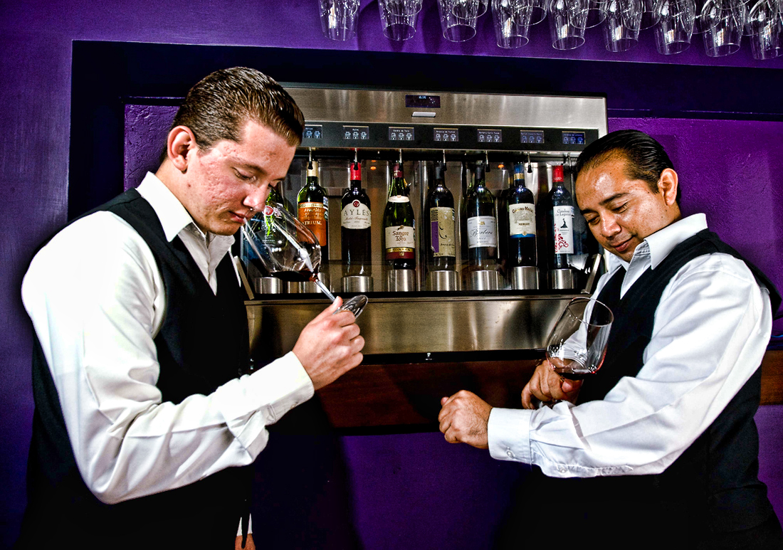 Sommeliers en action